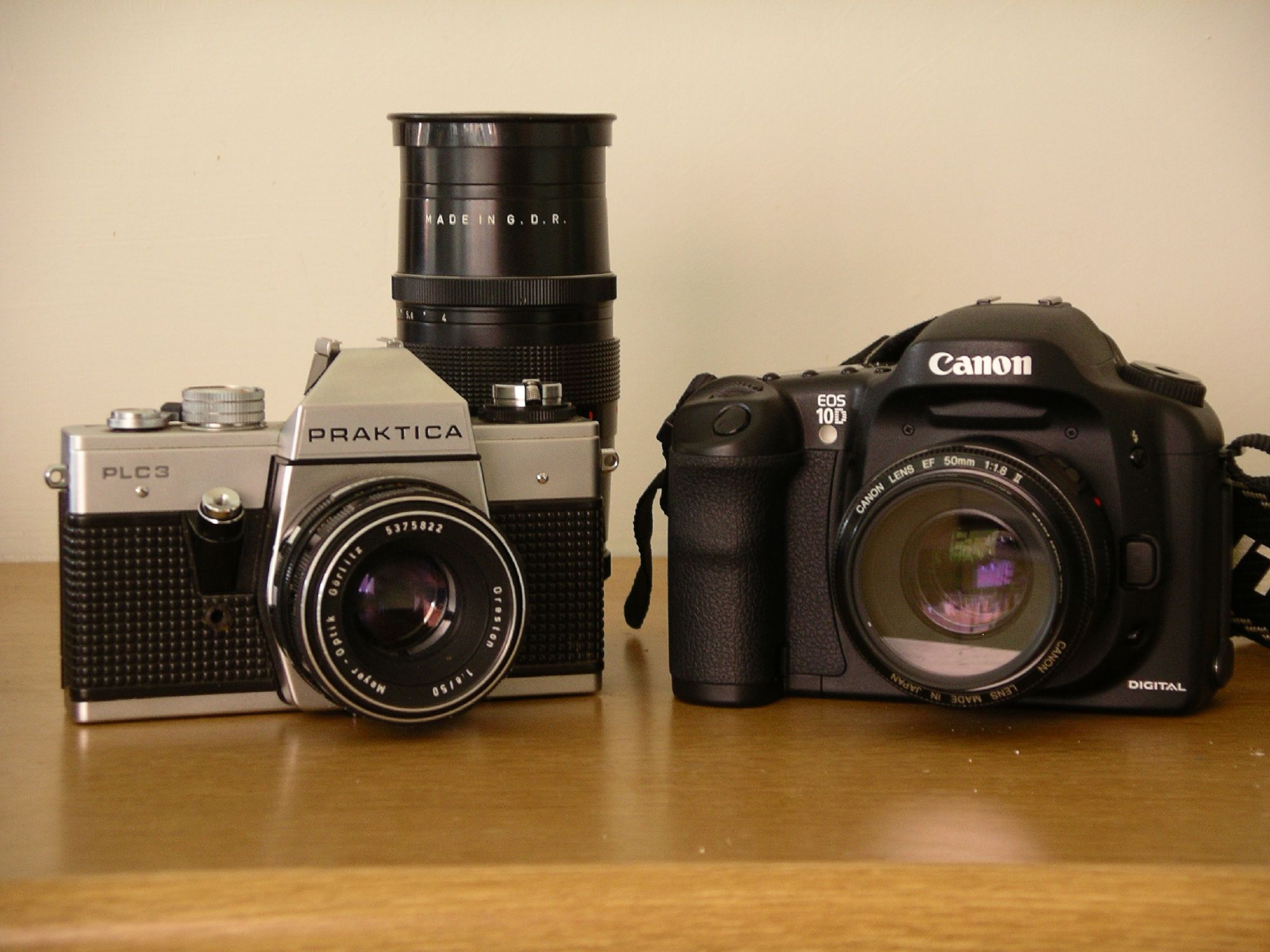 SLR CamerasIMGP3891